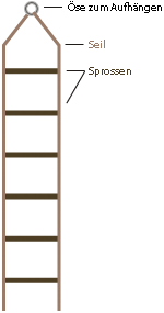 Strickleiter